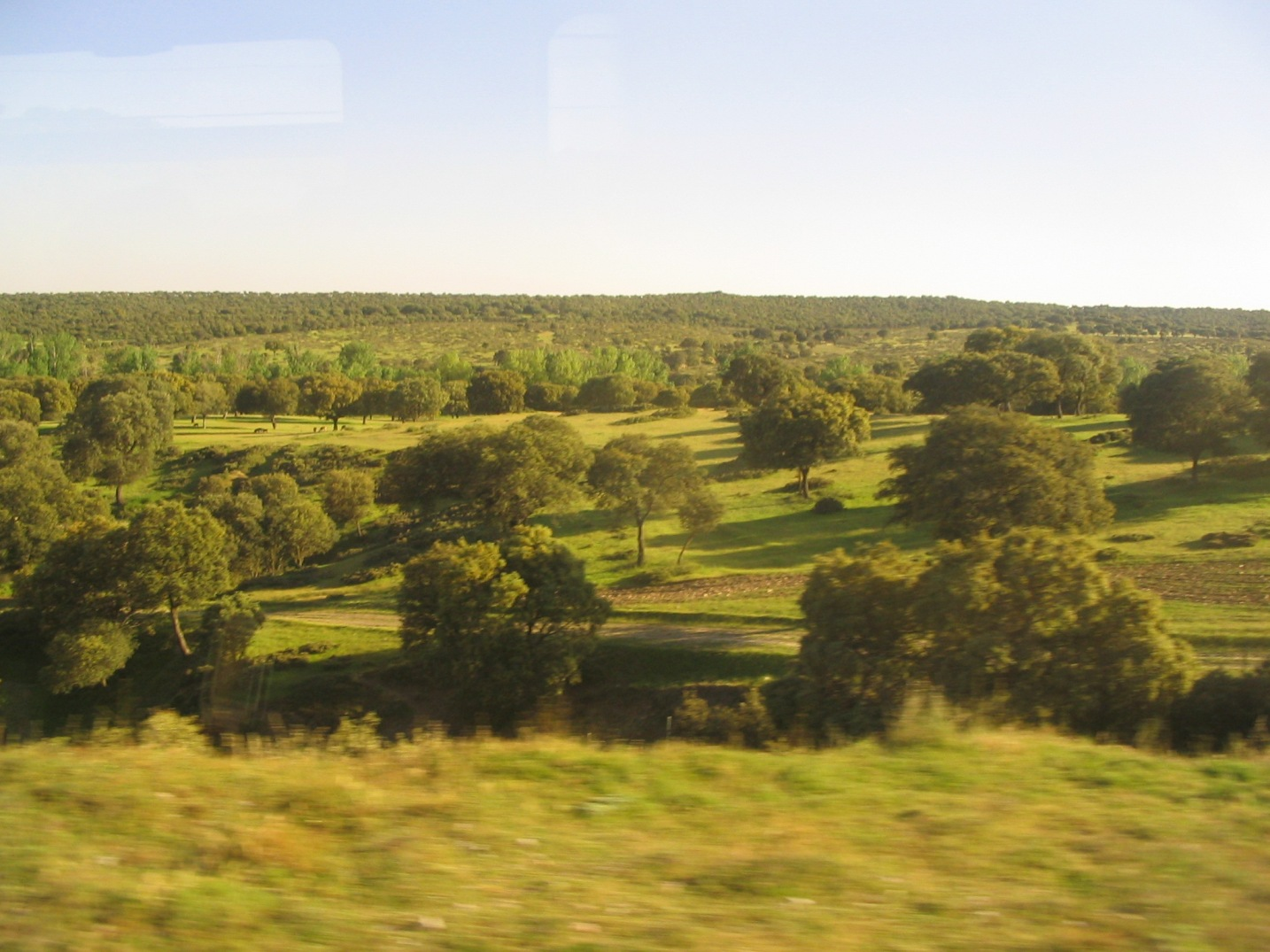 Monte del Pardo (Comunidad de Madrid), España